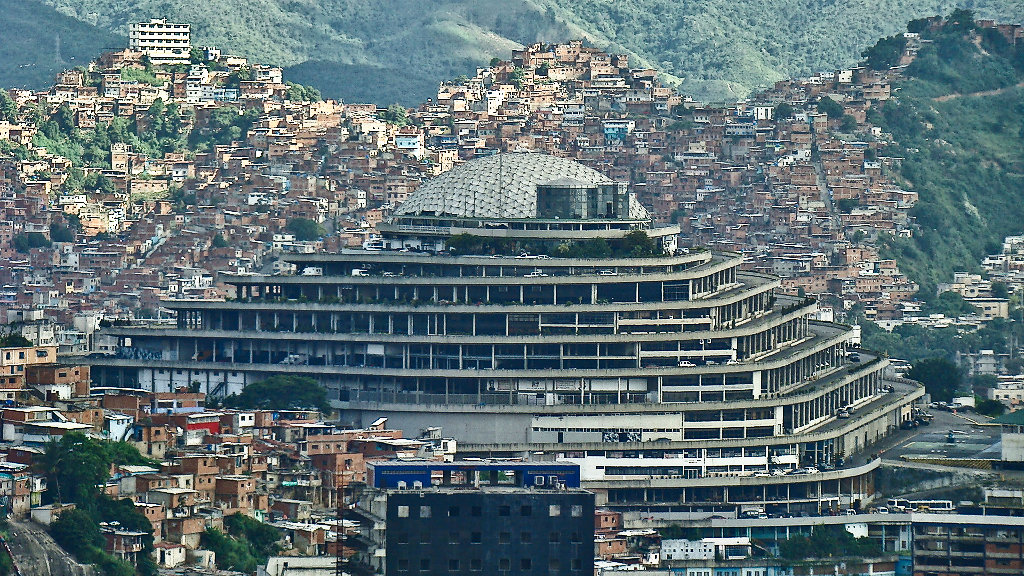 El Helicoide de la Roca Tarpeya